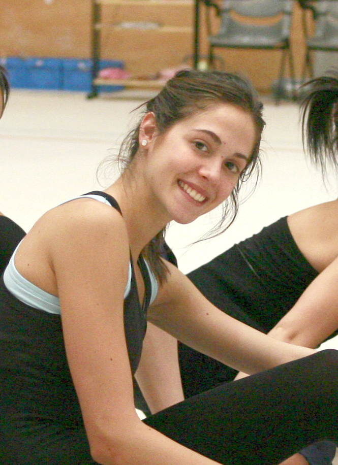 Bárbara González en el CAR de Madrid en el año 2007.